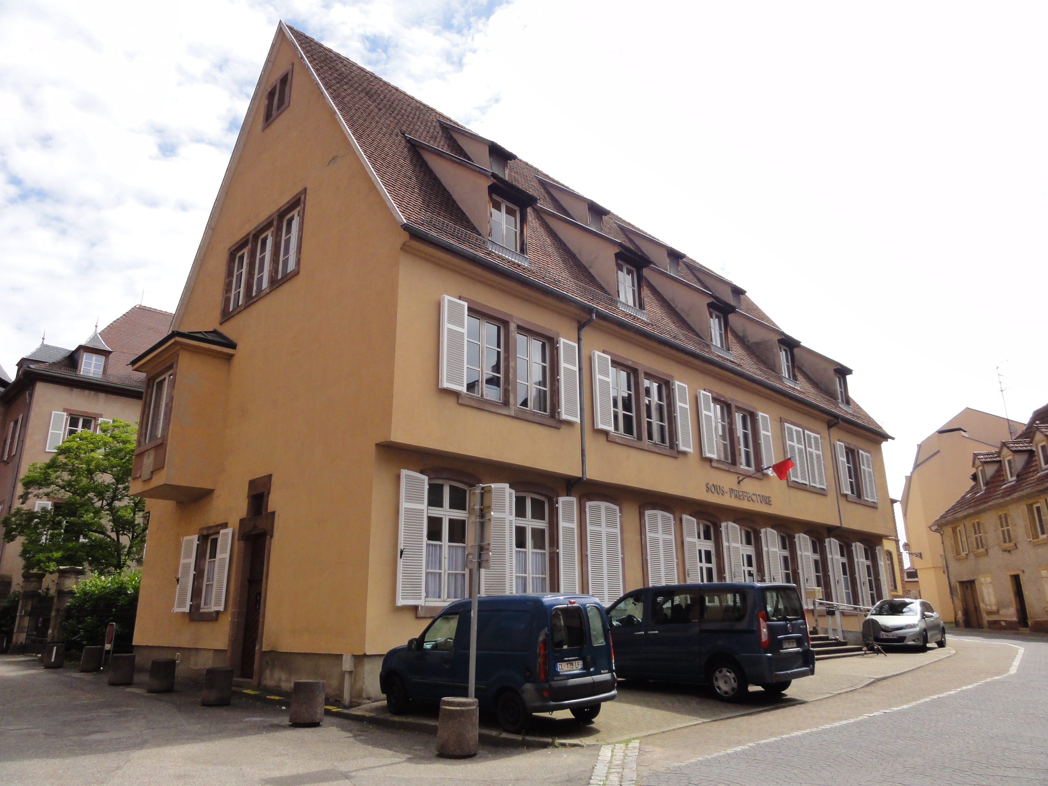 Alsace, Bas-Rhin, Saverne, Sous-Préfecture, rue du Tribunal.